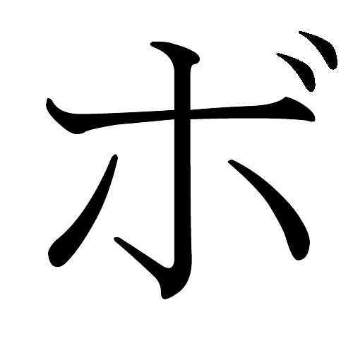 Japanese Katakana "Bo"